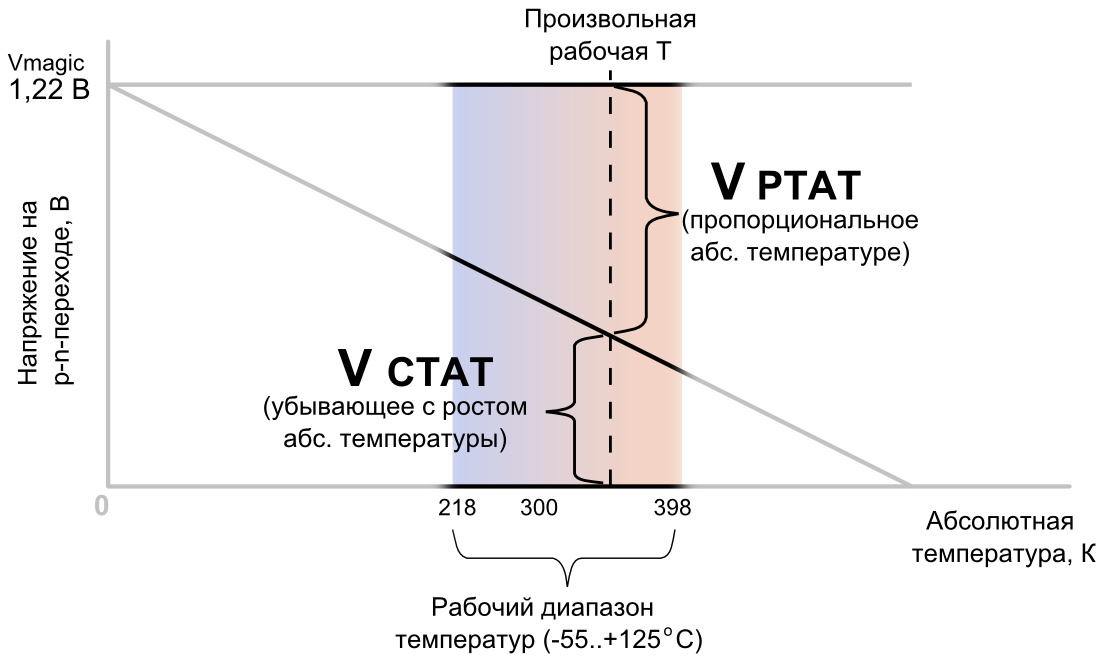 Принцип работы бандгапа (источника опорного напряжения типа bandgap)